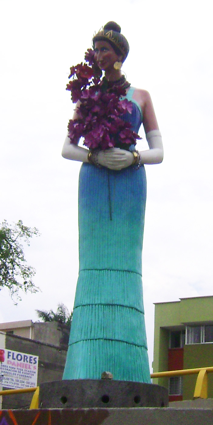 Monumento a Jovita Feijoó. "Jovita Reina Infinita". Autor: Diego Pombo